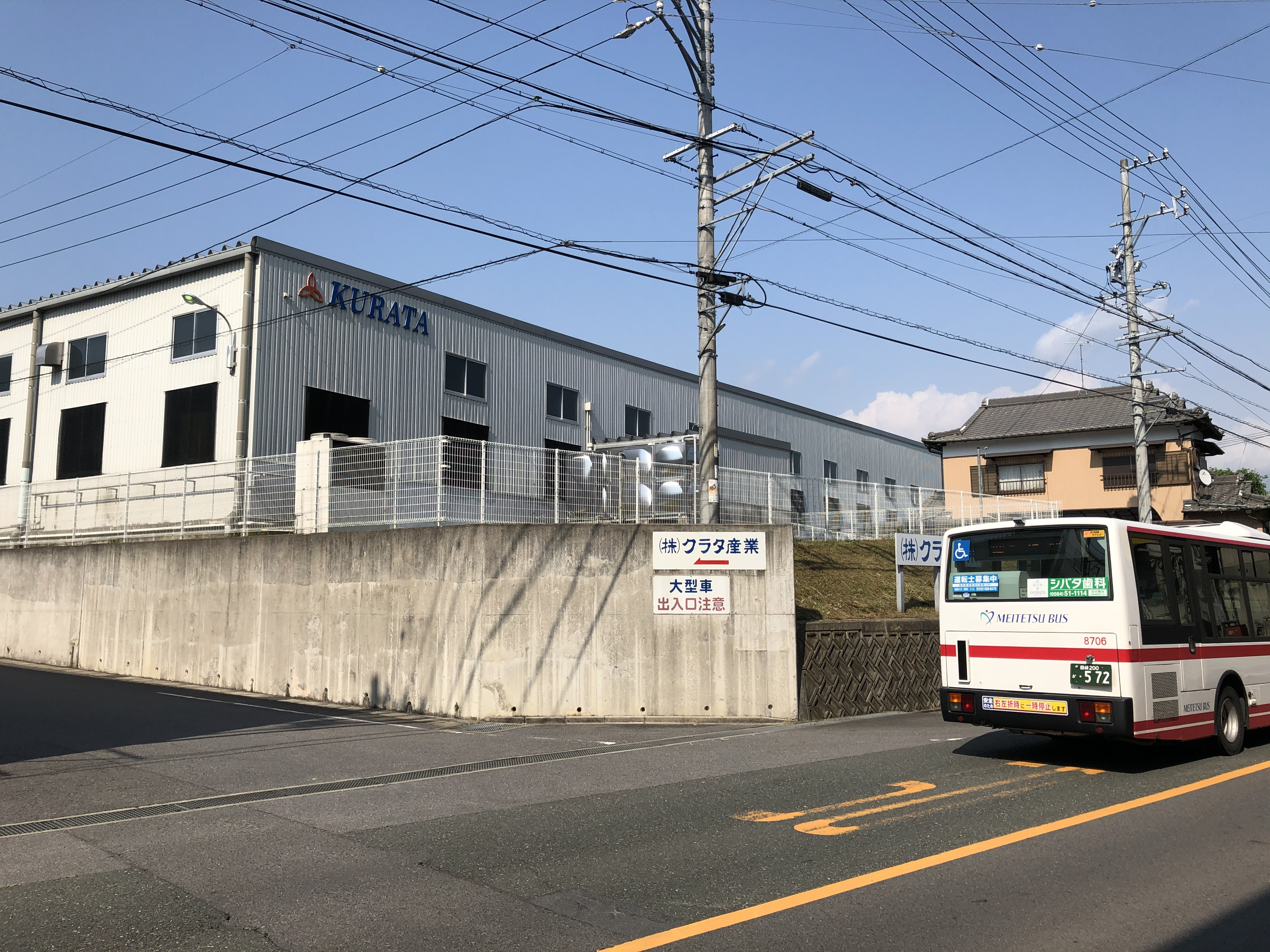 クラタ産業（岡崎市羽栗町）